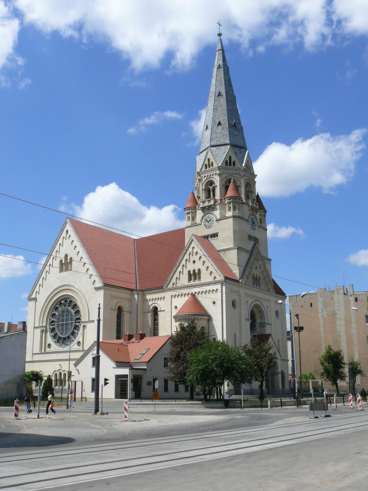 Kościół św. Mateusza w Łodzi, przy ulicy Piotrkowskiej